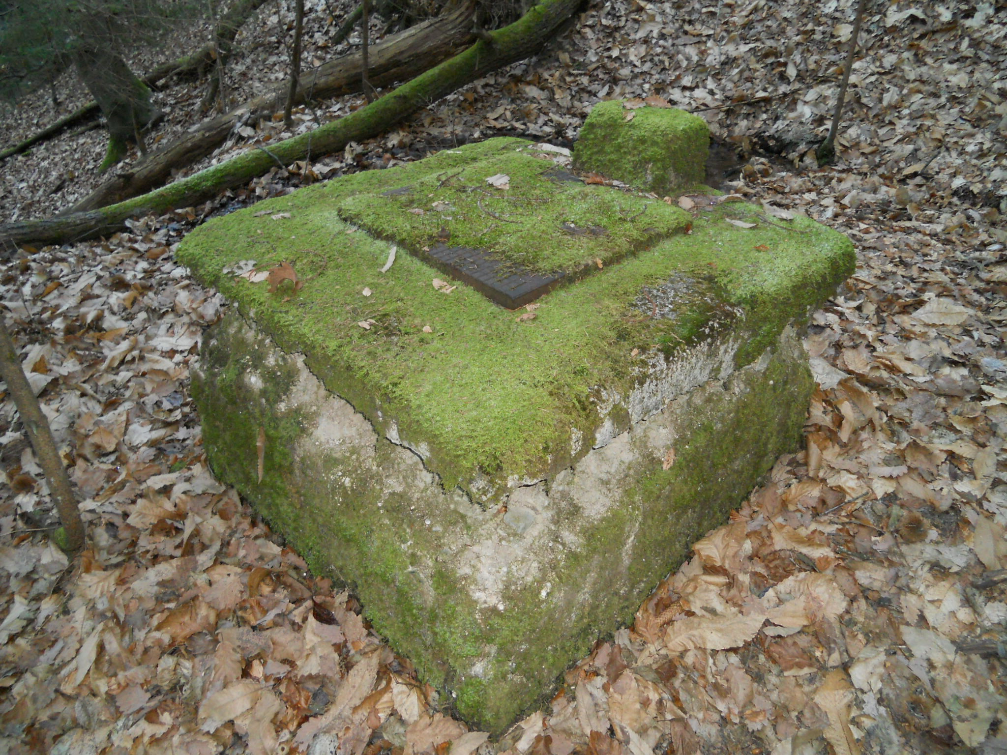 Vodno zajetje Gunclje